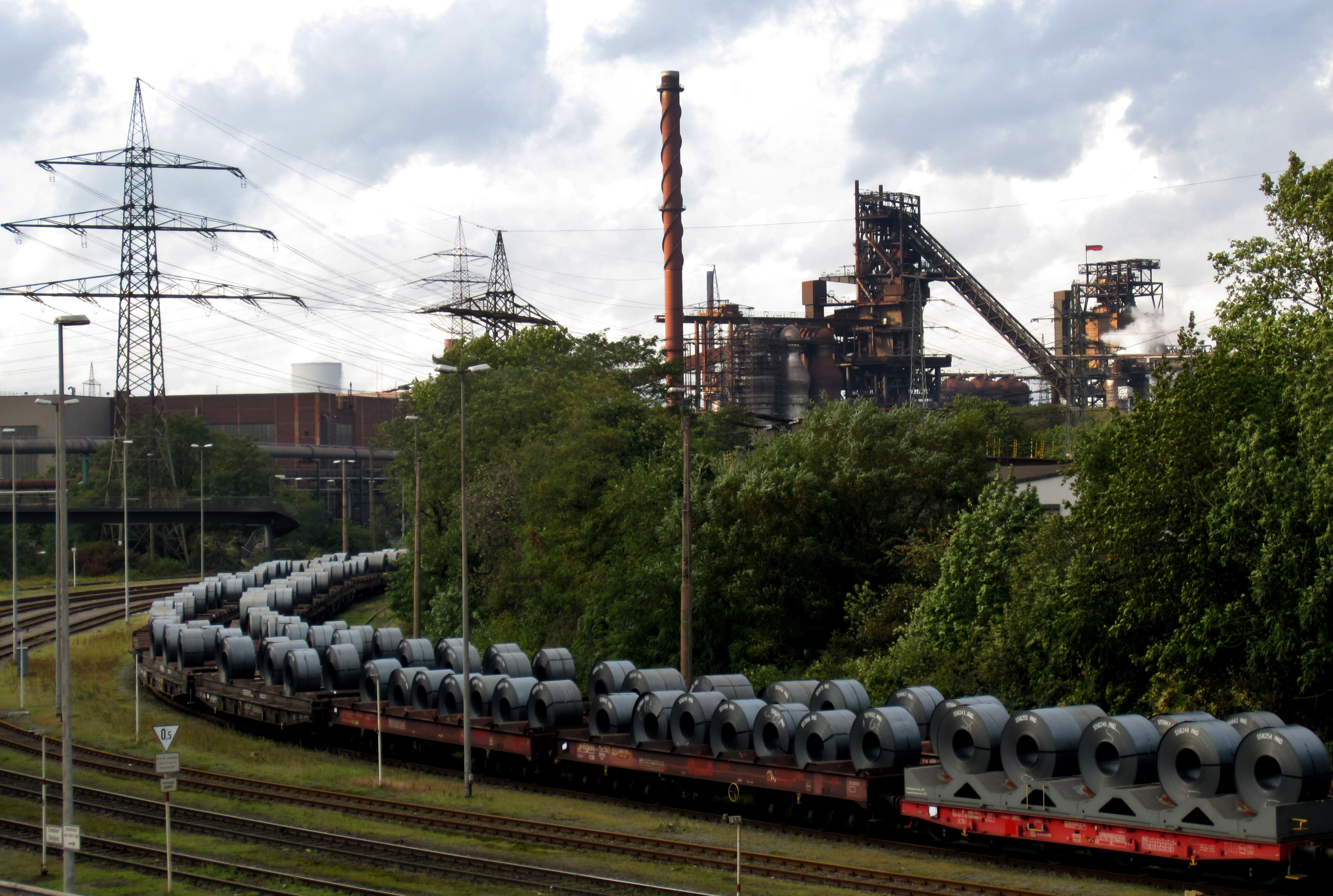 ThyssenKrupp Steel, Werk Bruckhausen, Stahwerk Hochofenbetrieb Schwelgern, Zug mit Stahlcoils im Vordergrund